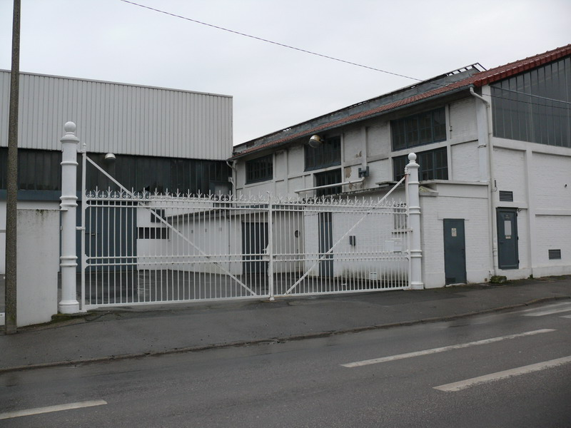 Tramway d'Eu-Le Tréport-Mers ce qui reste du dépôt en 2006